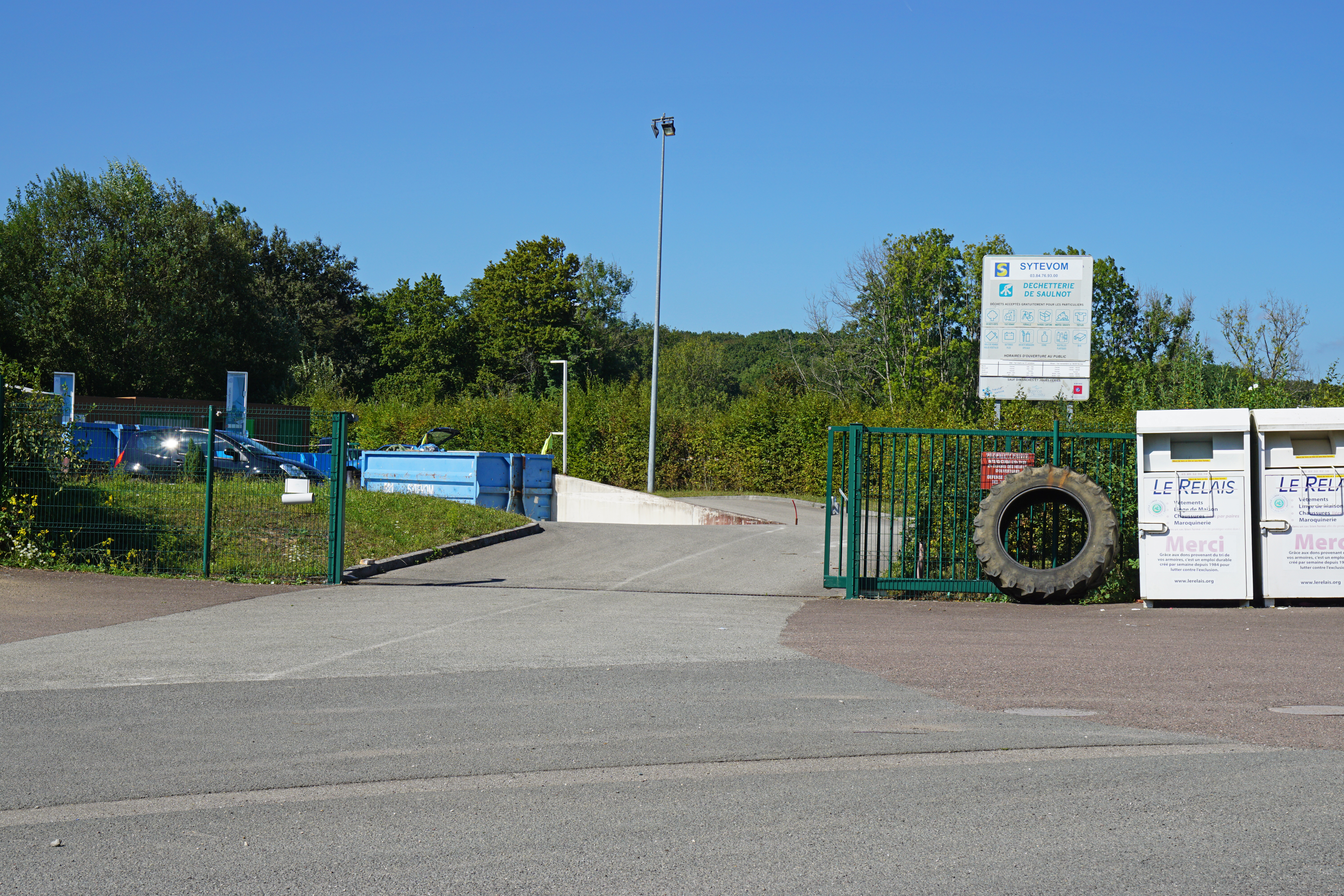 La déchetterie de Saulnot.